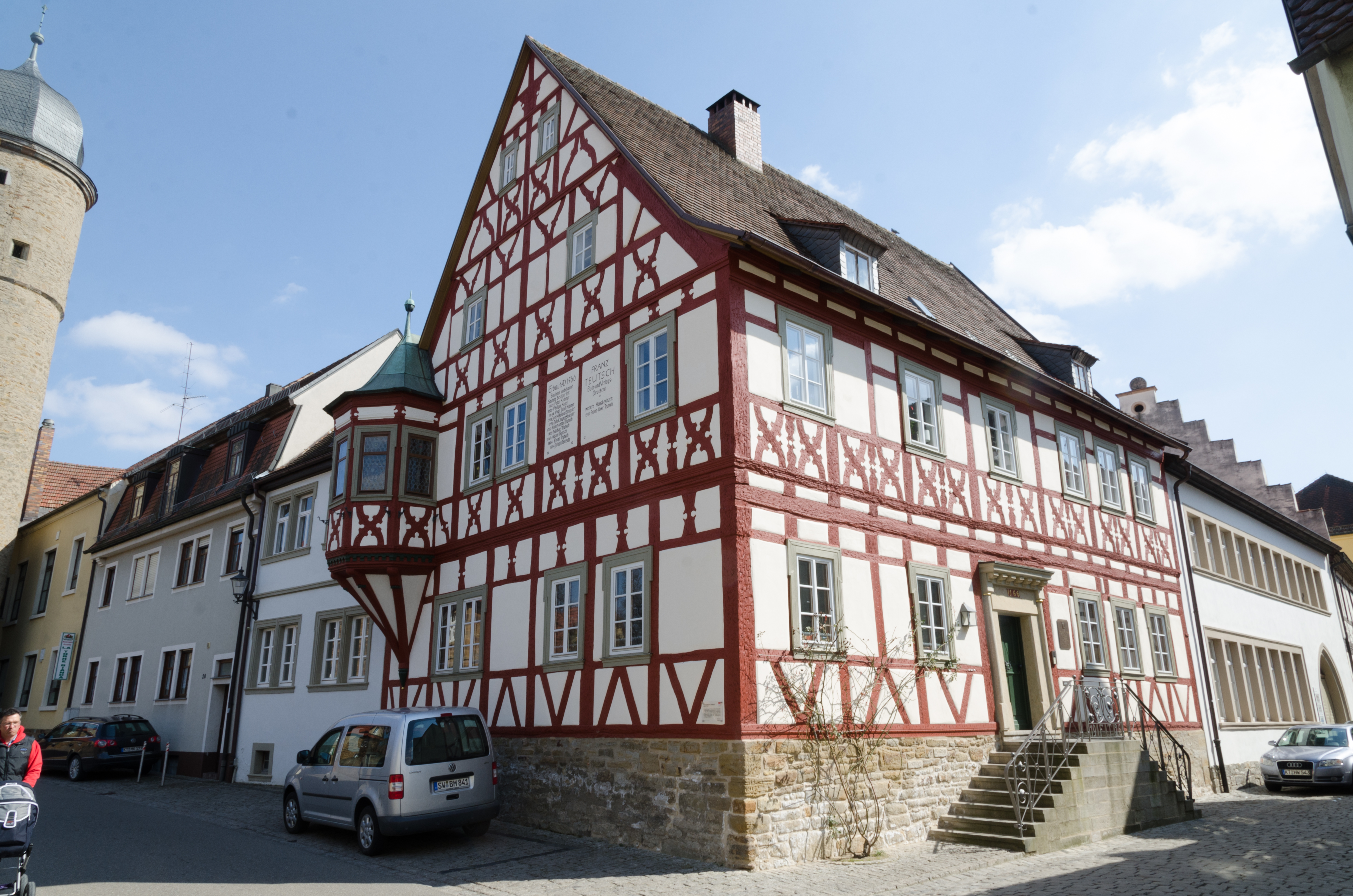 Gerolzhofen, Weiße Turm Strasse 18